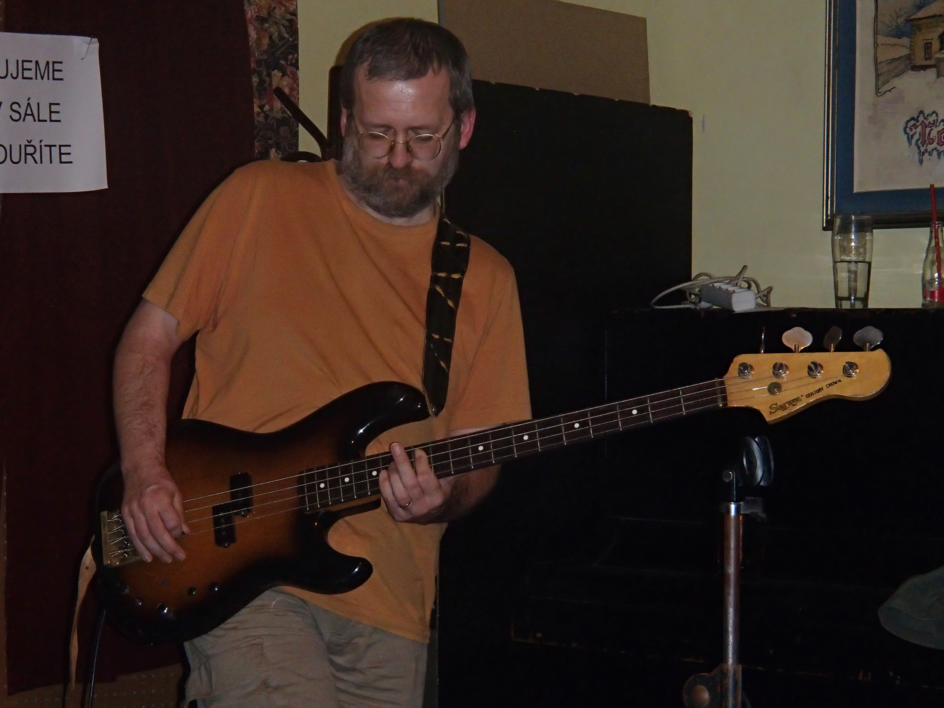 Petr Hernych na koncertě kapely Původní Bureš